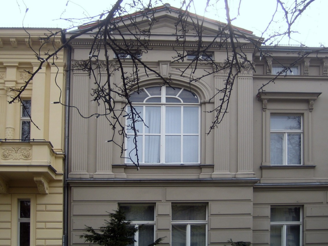 Berlin, Genthiner Str. 30. Studio of Luise Begas-Parmentier (1850-1920).